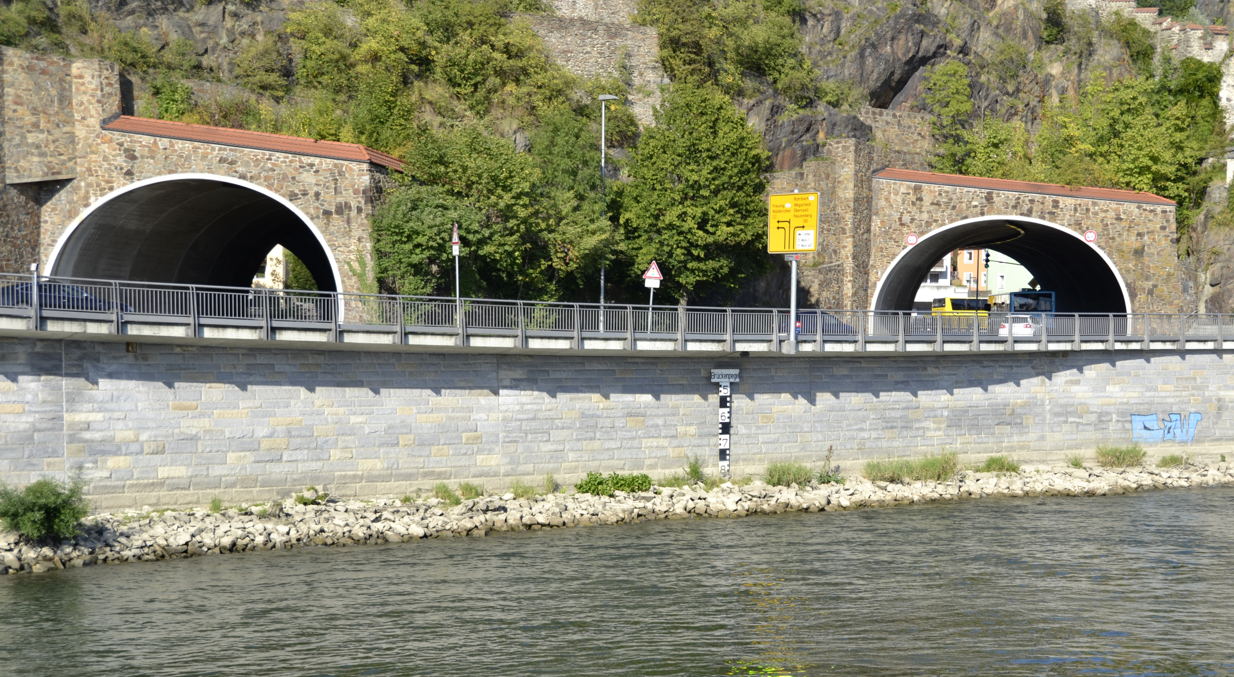 Die beiden Straßentunnel (Ilzdurchbruch) durch den Georgsberg in Passau, Bayern.